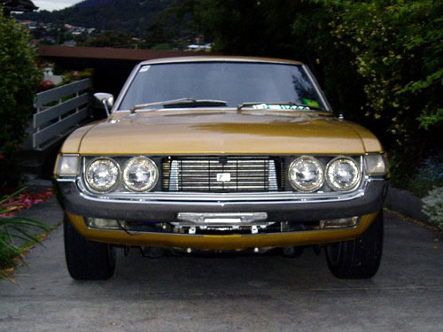 Modelo Celica del año 1972